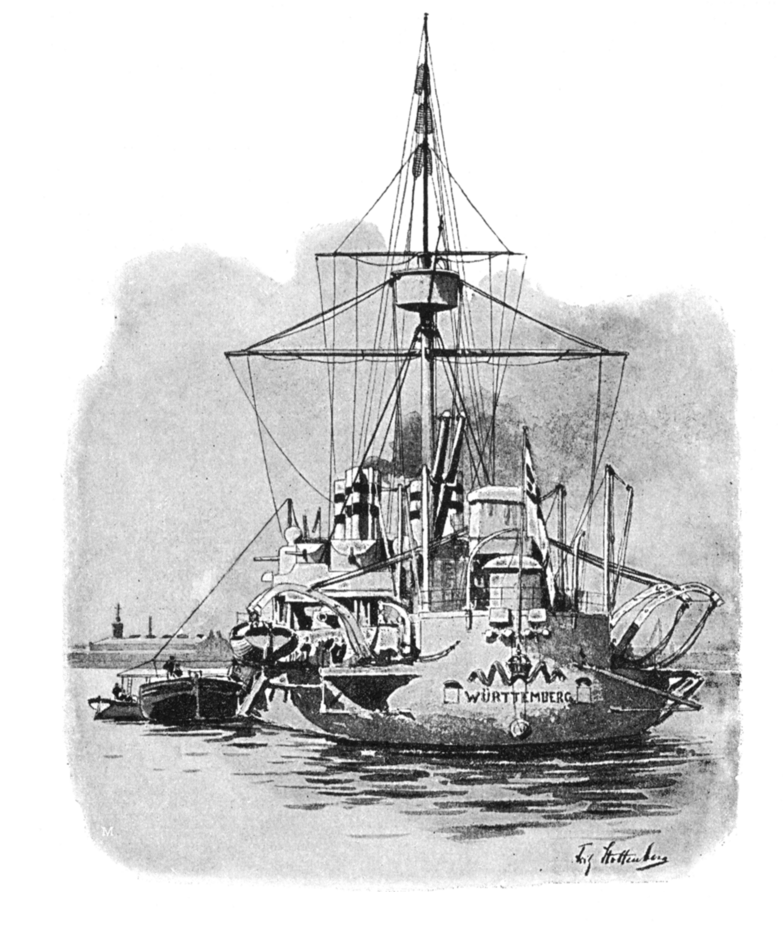 Panzerkorvette SMS Württemberg (1878), Zeichnung von Fritz Stoltenberg un 1895